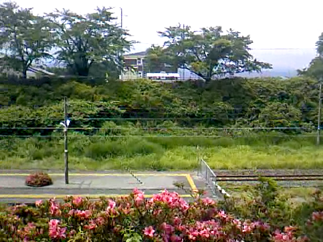 JR常磐線 夜ノ森駅 ホームを望む